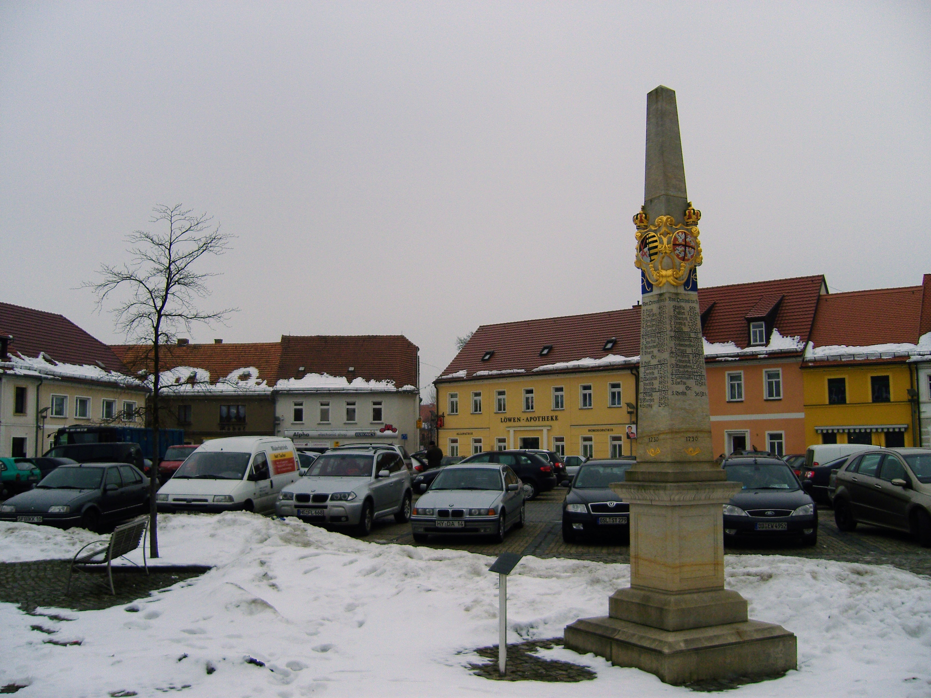 Marktplatz in Ortrand mit Kopie einer Kursächsischen Postmeilensäule, Baudenkmal